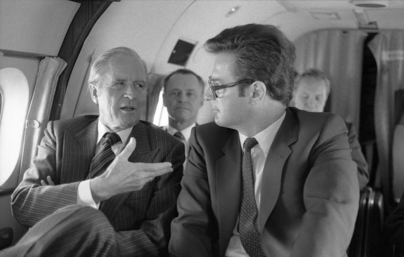 Bundespräsident Karl Carstens besucht Bundesnachrichtendienst in Pullach